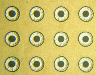 Foto